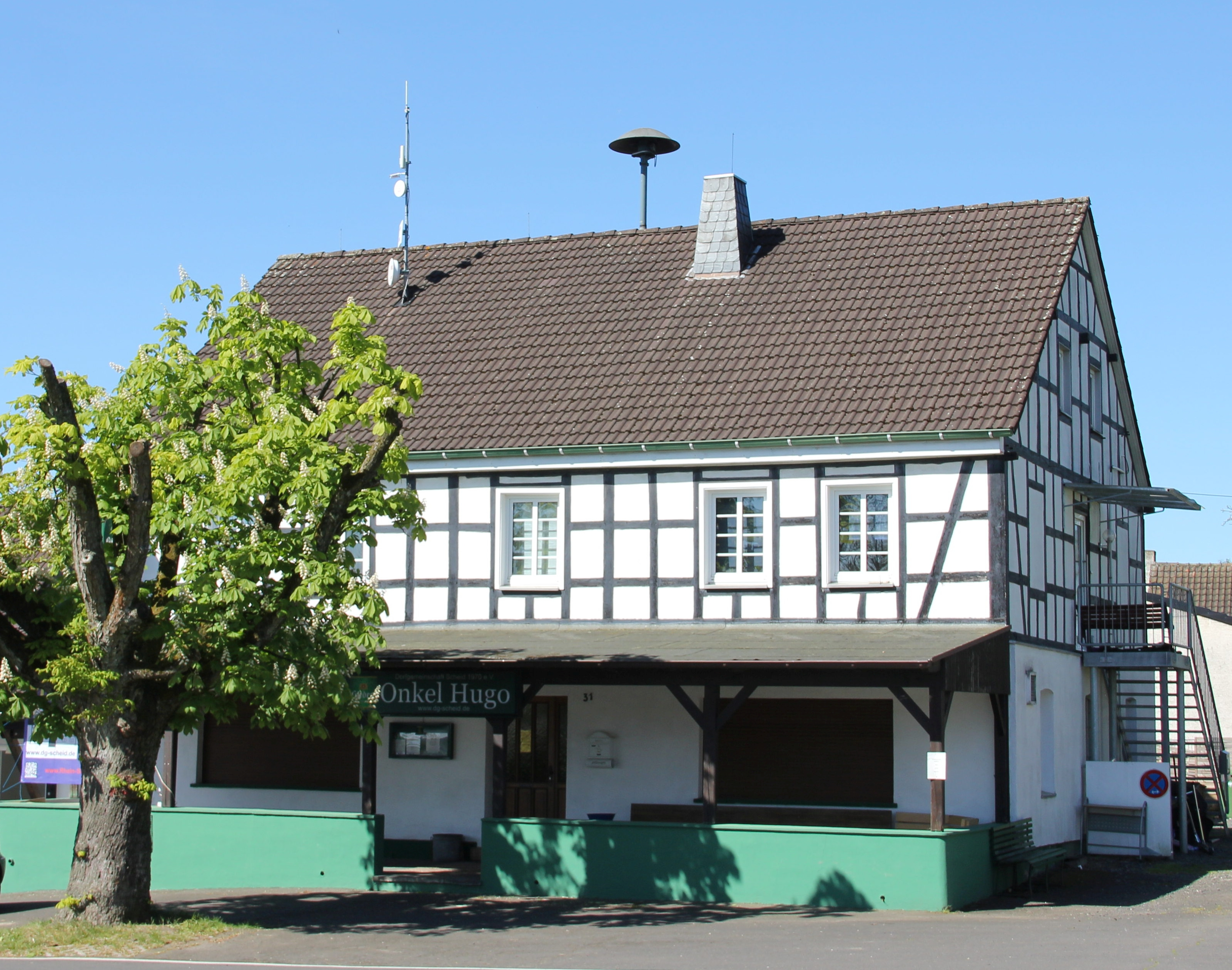 ehemalige Traditionsgaststätte Onkel Hugo in Scheid, heute betrieben von der Dorfgemeinschaft Scheid e.V.